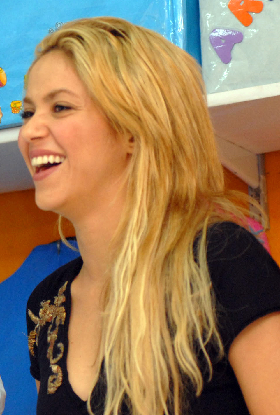 Shakira in 2011.